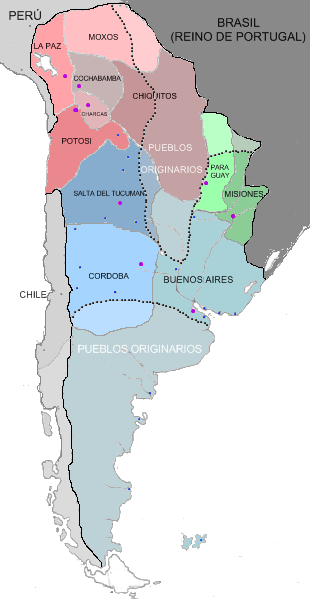 Mapa de las divisiones internas del virreinato del Río de la Plata